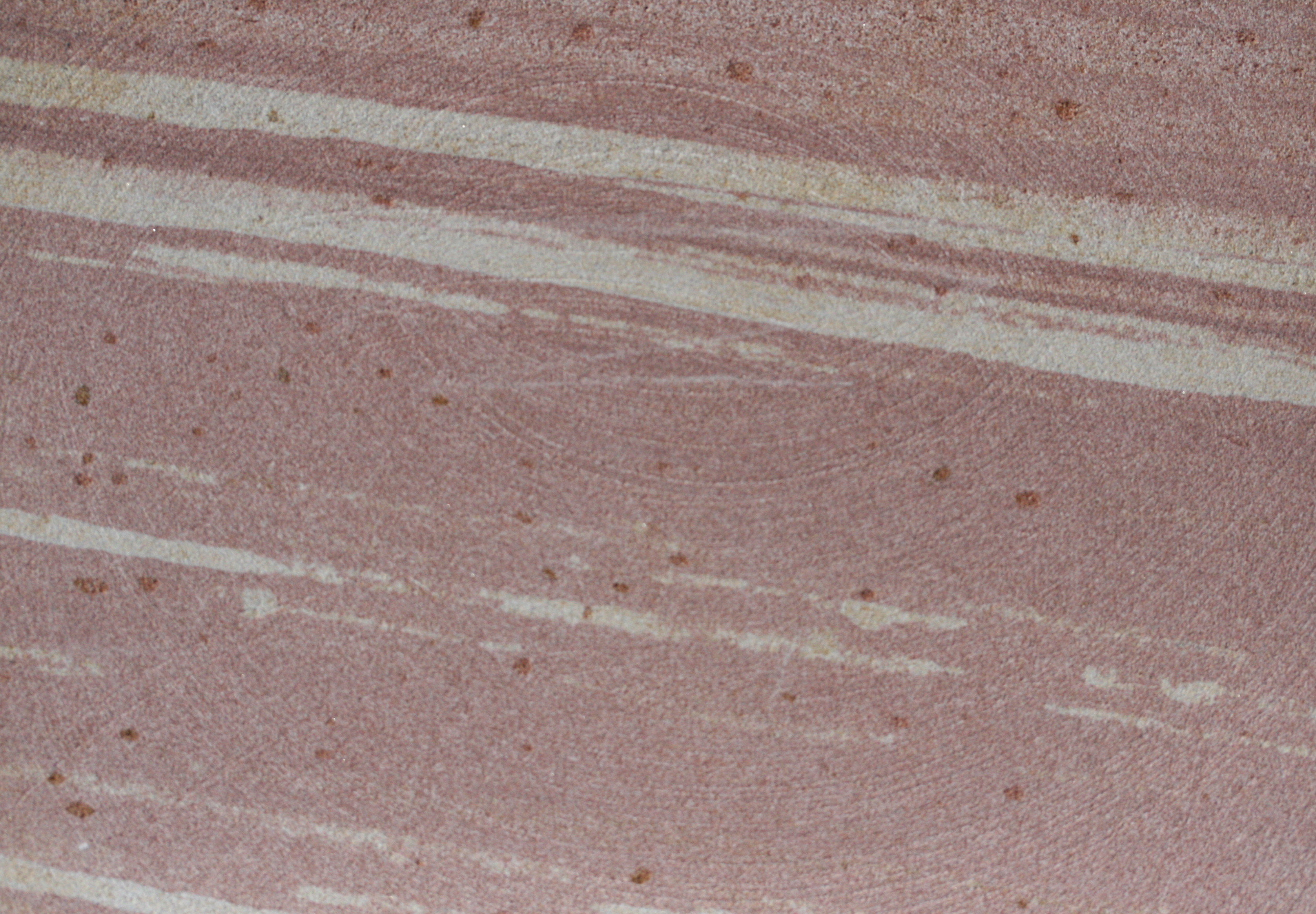 Mainsandstein aus Dorfprozelten (mit deutlichen Schleifspuren einer Schleifmaschine)